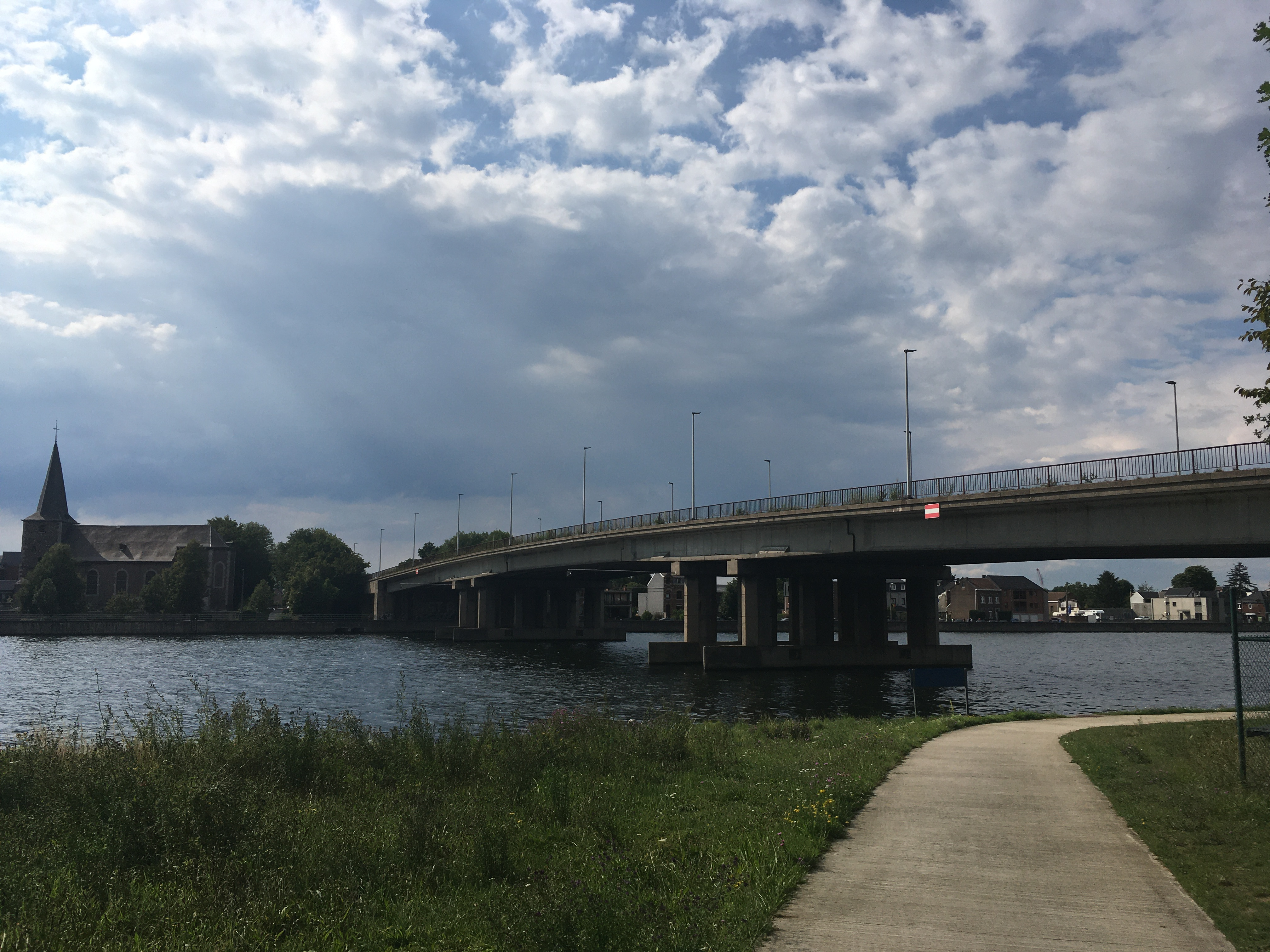 Brug over de Maas bij Hermalle-sous-Argenteau, in juli 2020, zicht op het noord-westen.